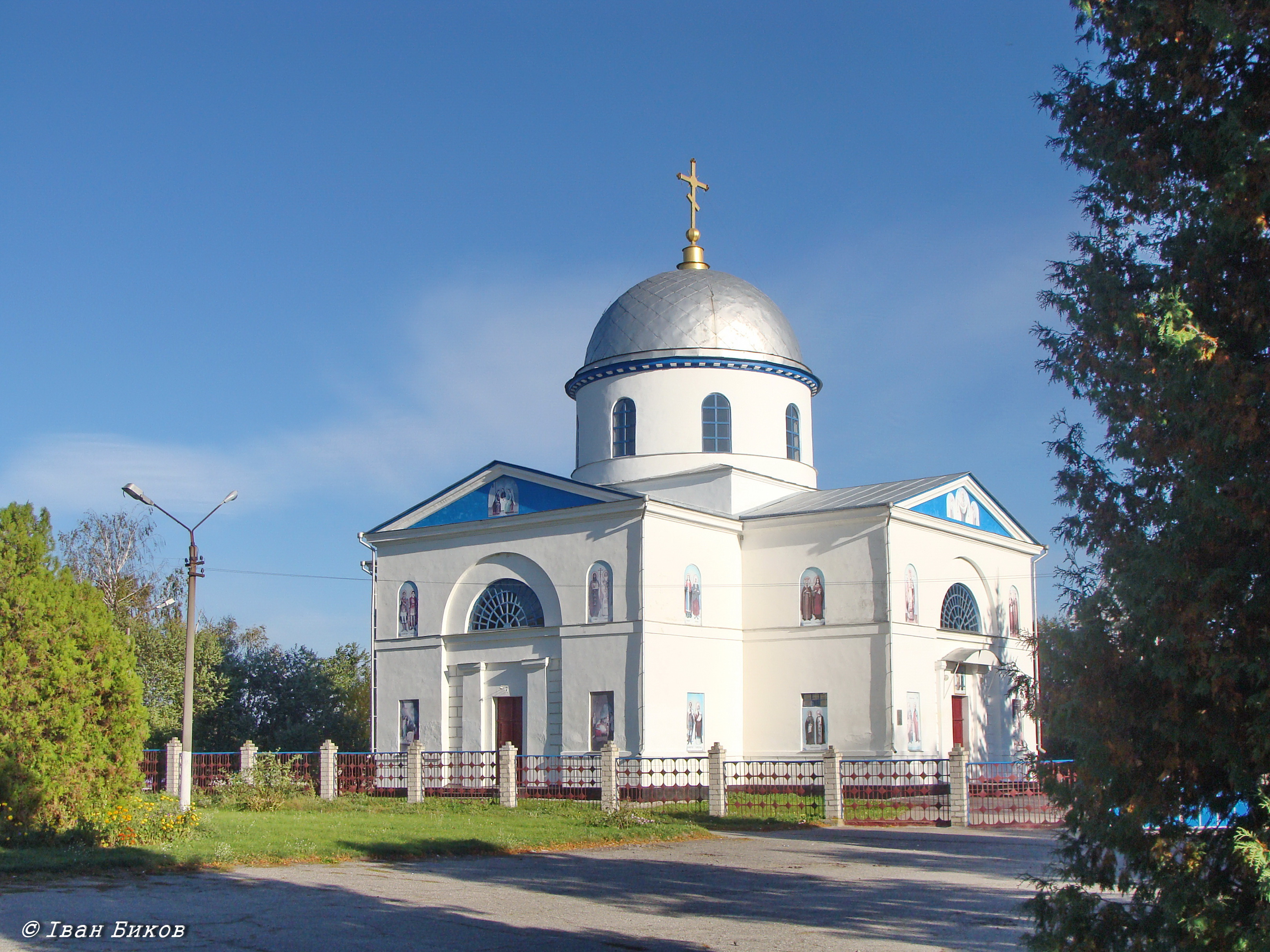 Іоакимо-Аннинська церква (мур.), село Слобода